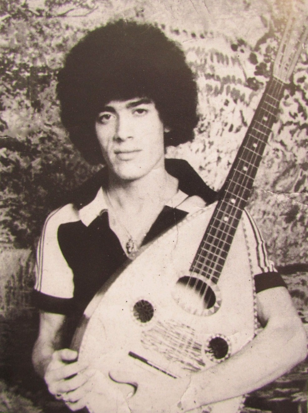 Lounèes Matoub en 1975, chanteur algérien de musique kabyle (1956-1998).